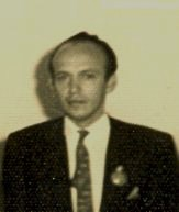 Foto de la cédula de identidad de Eduardo Flores Torres